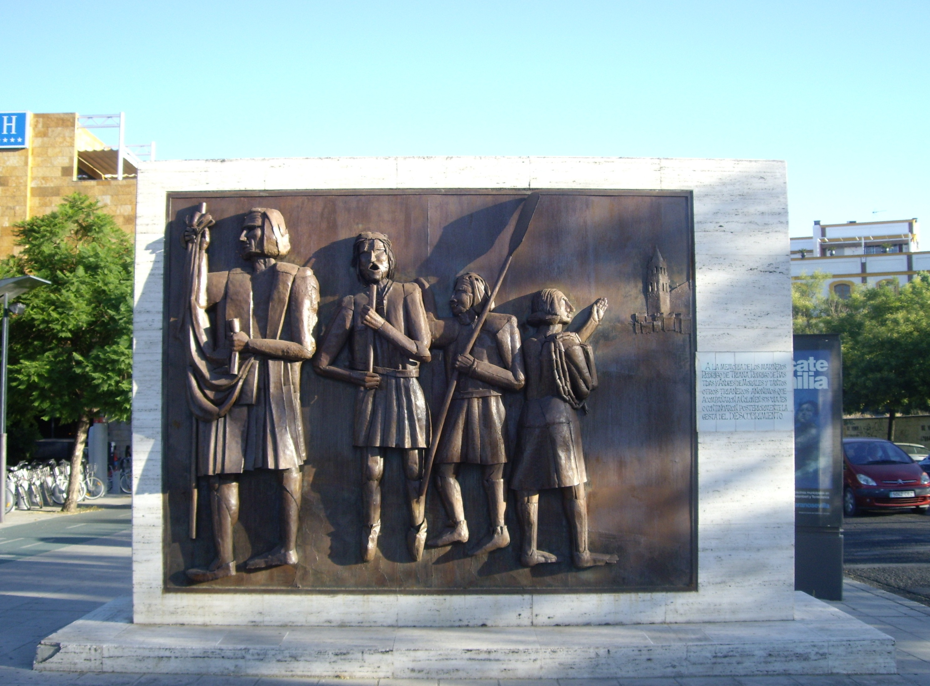 Monumento de arte contemporáneo en la Plaza de Chapina, barrio de Triana, Sevilla. El título de la obra artística es "Monumento a los ángeles trianeros".Fue realizado en 1992 por Gabriel Mozas. El mural el bronce muestra a Colón y a un grupo de marineros. El de la derecha levanta la mano para despedirse de Triana, distinguida por el relieve de la torre de la Iglesia de Santa Ana. Junto al mural existe una placa de cerámica que conmemora a Rodrigo de Triana, Rodrigo de Bastidas, Andrés de Morales y a los trianeros anónimos que contribuyeron en el descubrimiento y exploración de América.